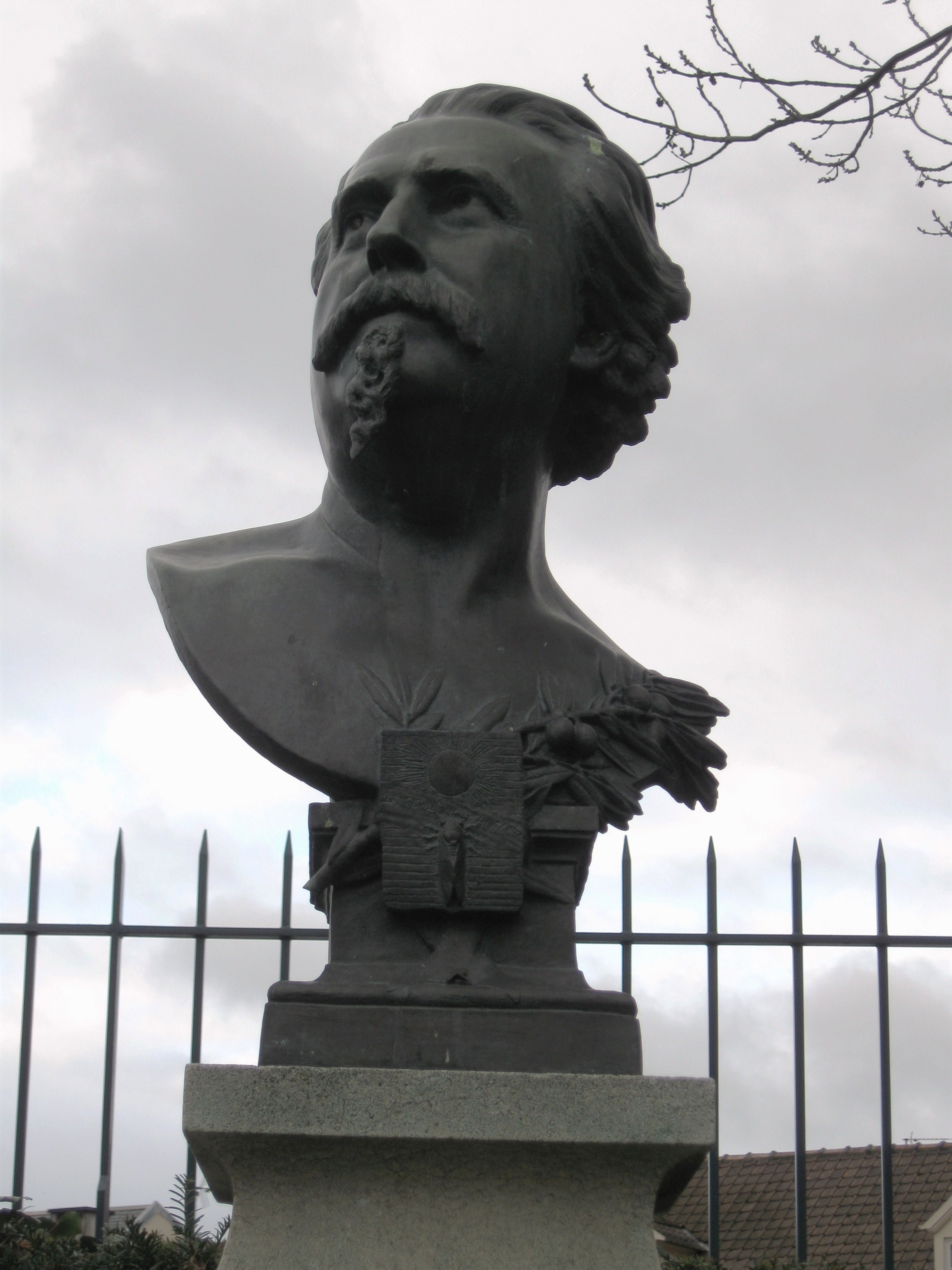 Buste de Frédéric Mistral (1830-1914) dans le Jardin des Félibres, Sceaux, Hauts-de-Seine, France